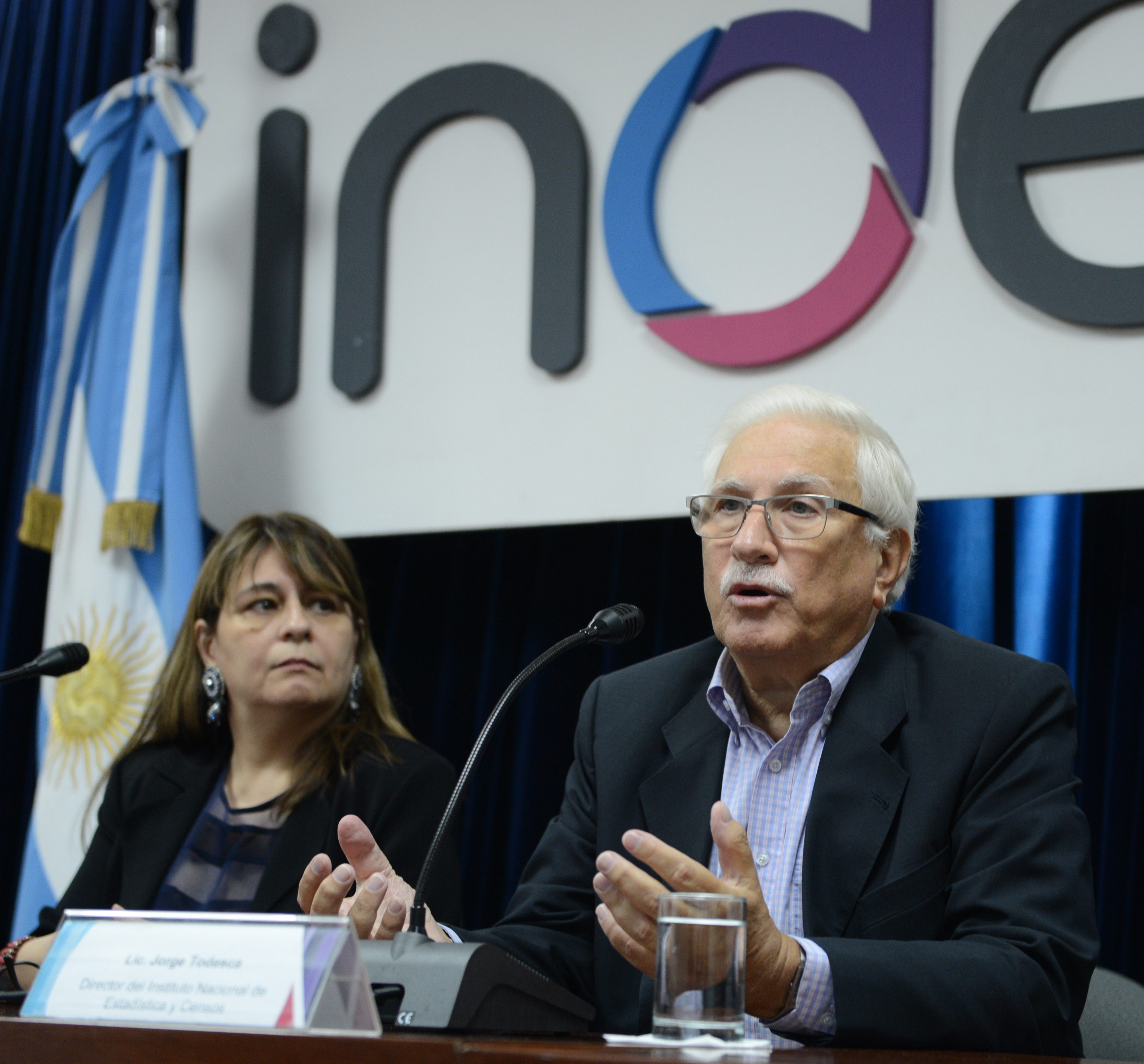 El director del INDEC, Jorge Todesca, señaló hoy que el objetivo de la nueva gestión es “ir reconstruyendo progresivamente a lo largo del año el conjunto de indicadores del Instituto para que podamos tener un 2016 estadísticamente completo y normalizado”. “Virtualmente hay cosas que tenemos que reconstruirlas de cero, en especial donde existe trabajo de campo, no porque la labor de los encuestadores haya sido individualmente mala sino porque ha sido sistemáticamente deficiente”, explicó Todesca en una conferencia de prensa que ofreció en la sede del organismo junto a la directora técnica, Graciela Bevacqua.